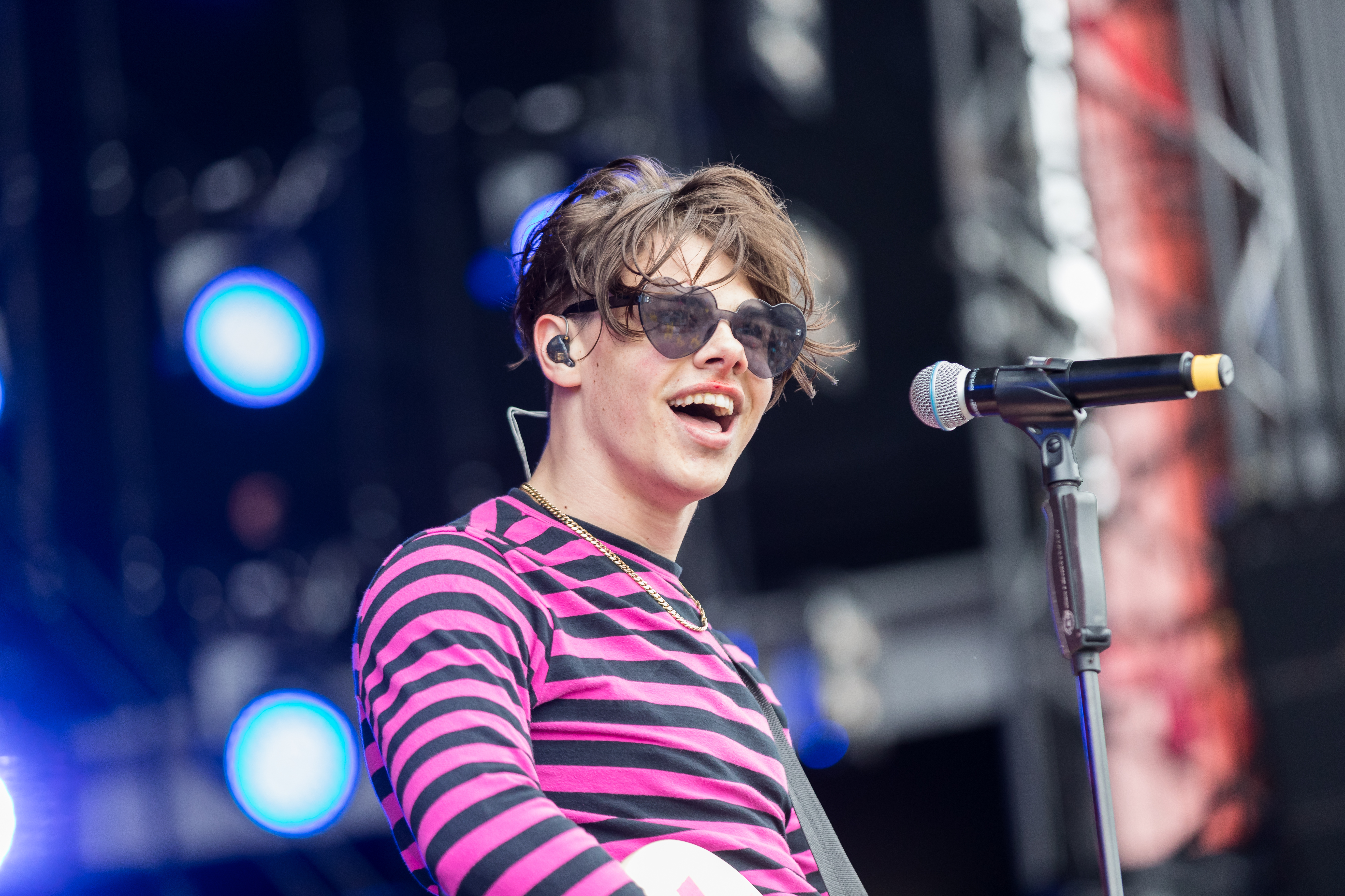 Yungblud @ Rock am Ring 2018